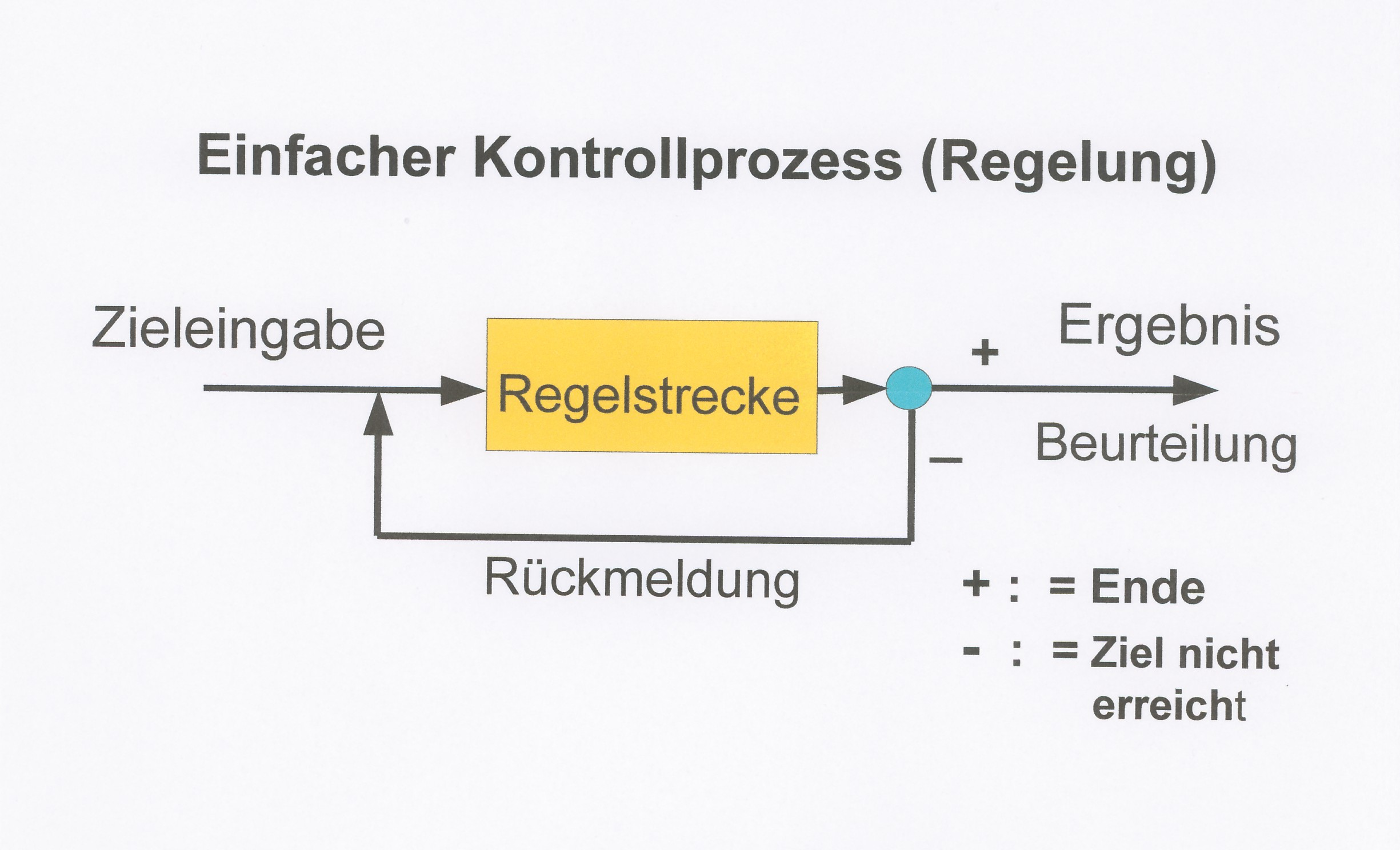 Einfache Rückkoppelungsschleife mit Zieleingabe, Regelstrecke, Ergebnisbeurteilung und Rückkoppelung, Autor: Jakarandatree, Quell-URL Eigene Arbeit vom September 2014